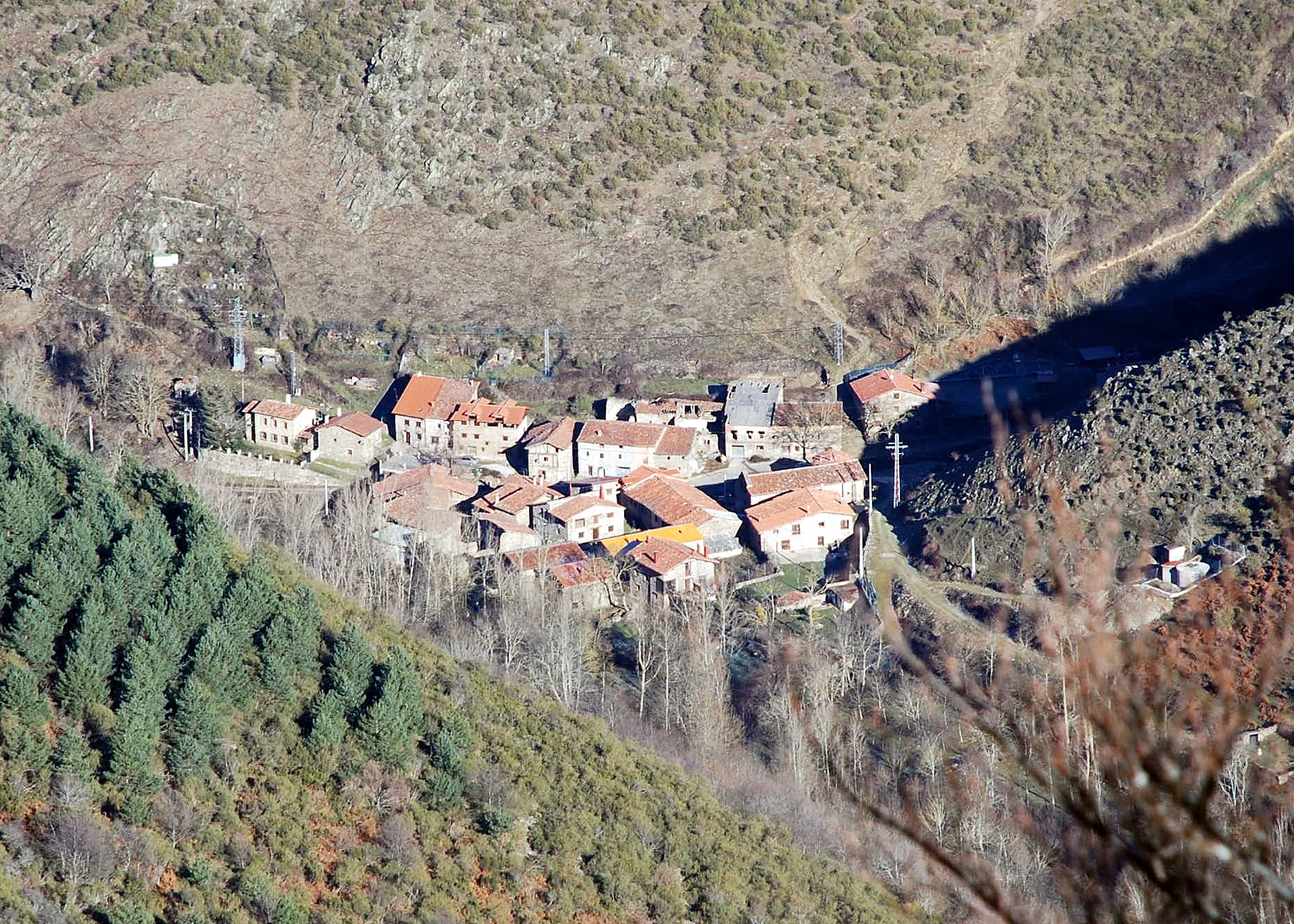 Urdanta, aldea de Ezcaray